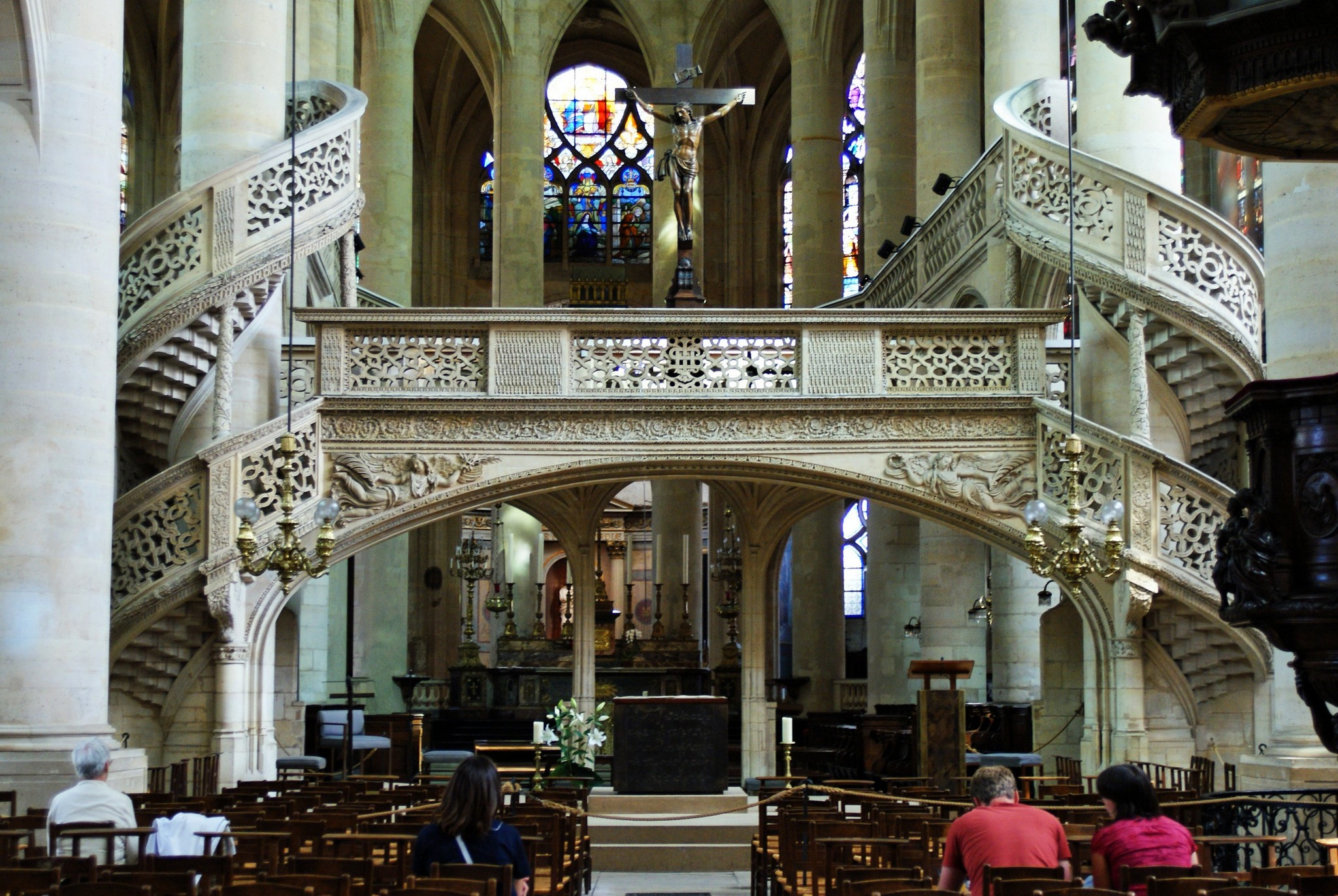 Magnifique jubé de l'église Saint Etienne du Mont